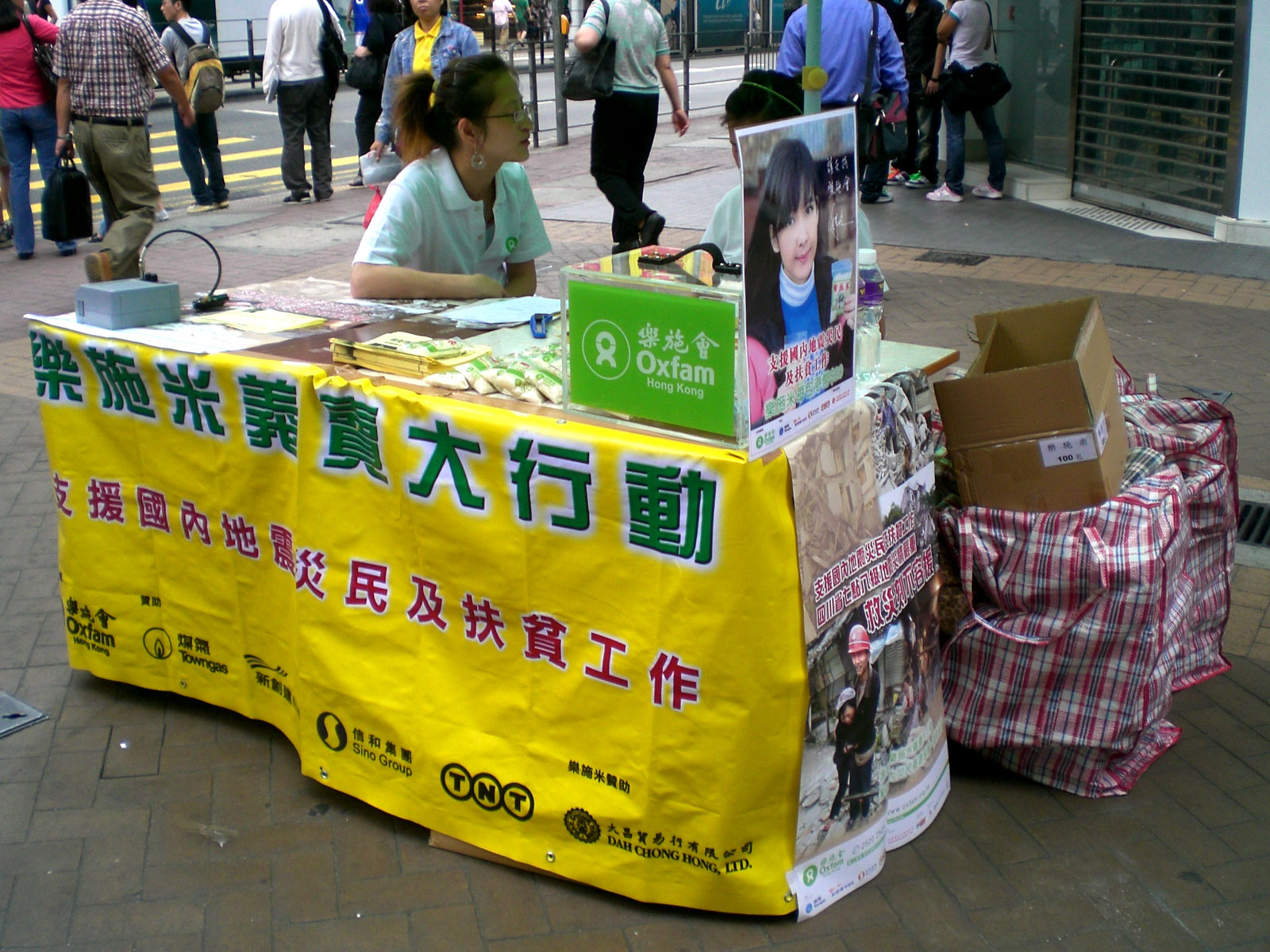 樂施會籌款 @ 灣仔站A3出口